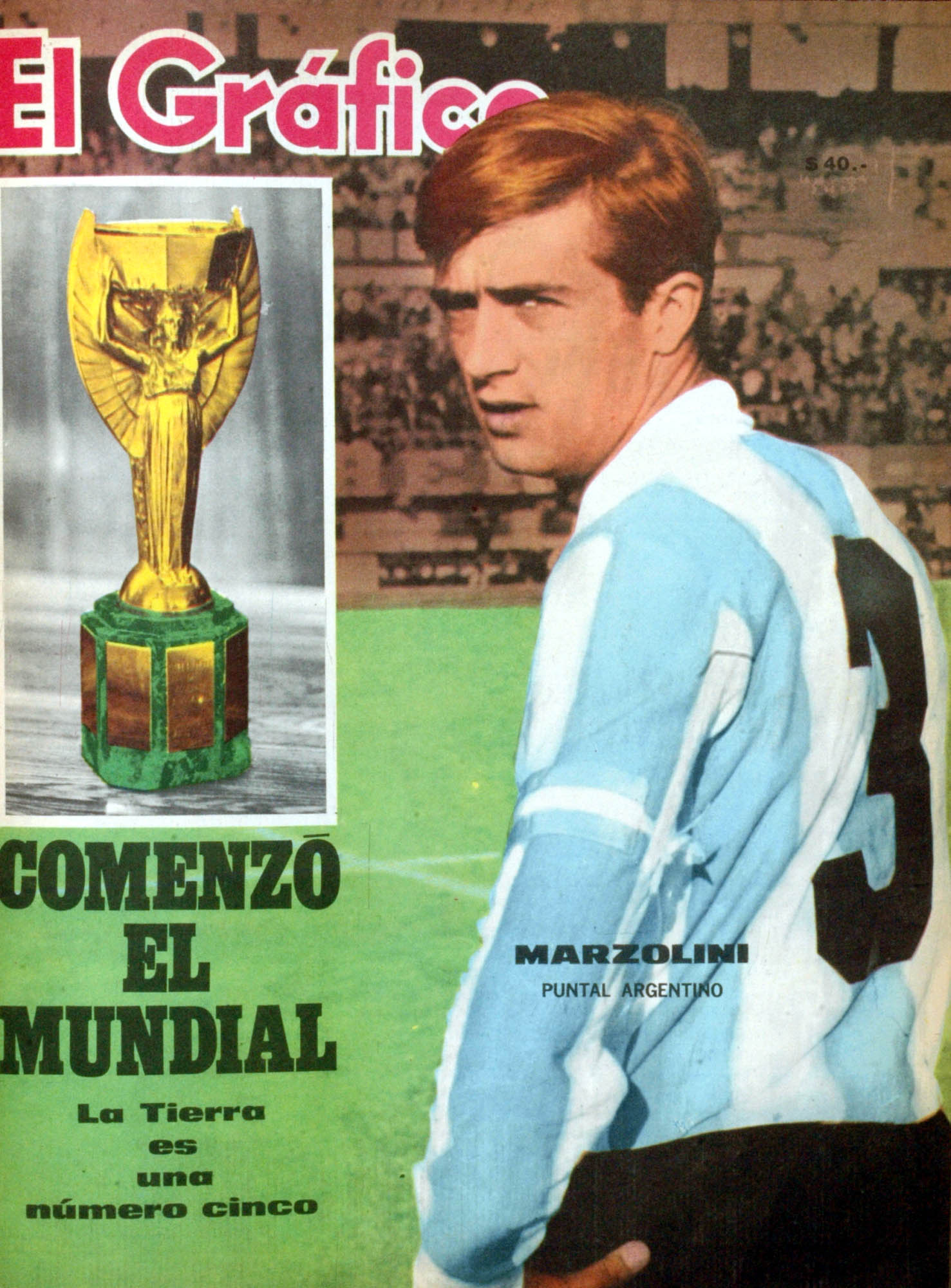 El Grafico del 12 de Julio de 1966. Edicion 2440